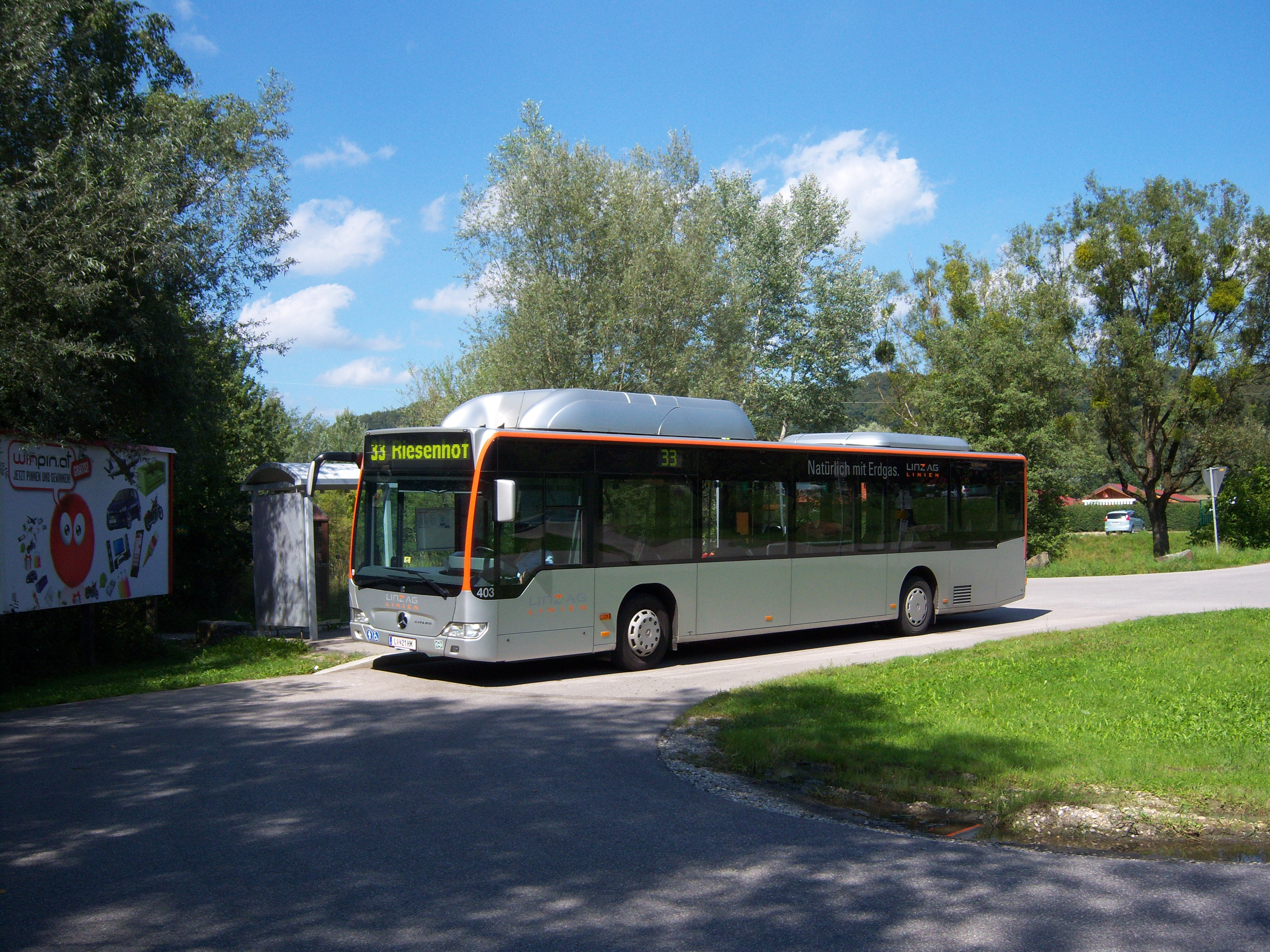 Autobushaltestelle Pleschinger See